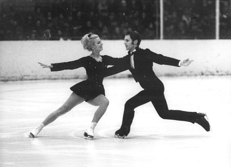 Annerose Baier, Eberhard Rüger Zentralbild Wendorf-17.1.1970 Berlin: Titelträger Annerose Baier - Eberhard Rüger. Bei den DDR-Meisterschaften im Eiskunstlauf und Eistanz am 17.1.1970 in Berlin errangen bei den Tanzpaaren erwartungsgemäß die EM-Fünften Annerose Baier - Eberhard Rüger vom SC Karl-Marx-Stadt ihren siebenten Titel.